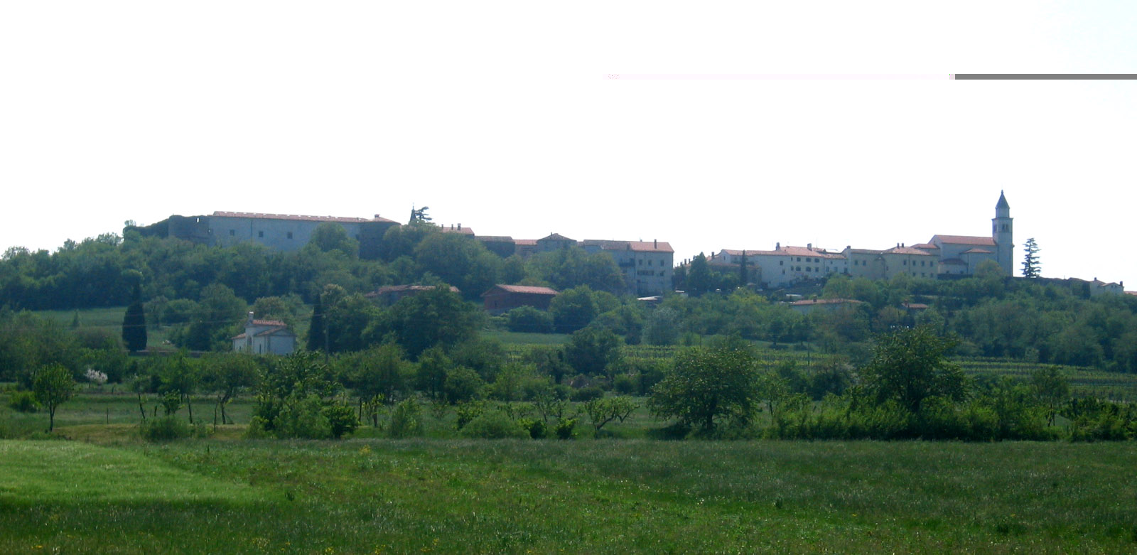 Vipavski Križ, village in Slovenia